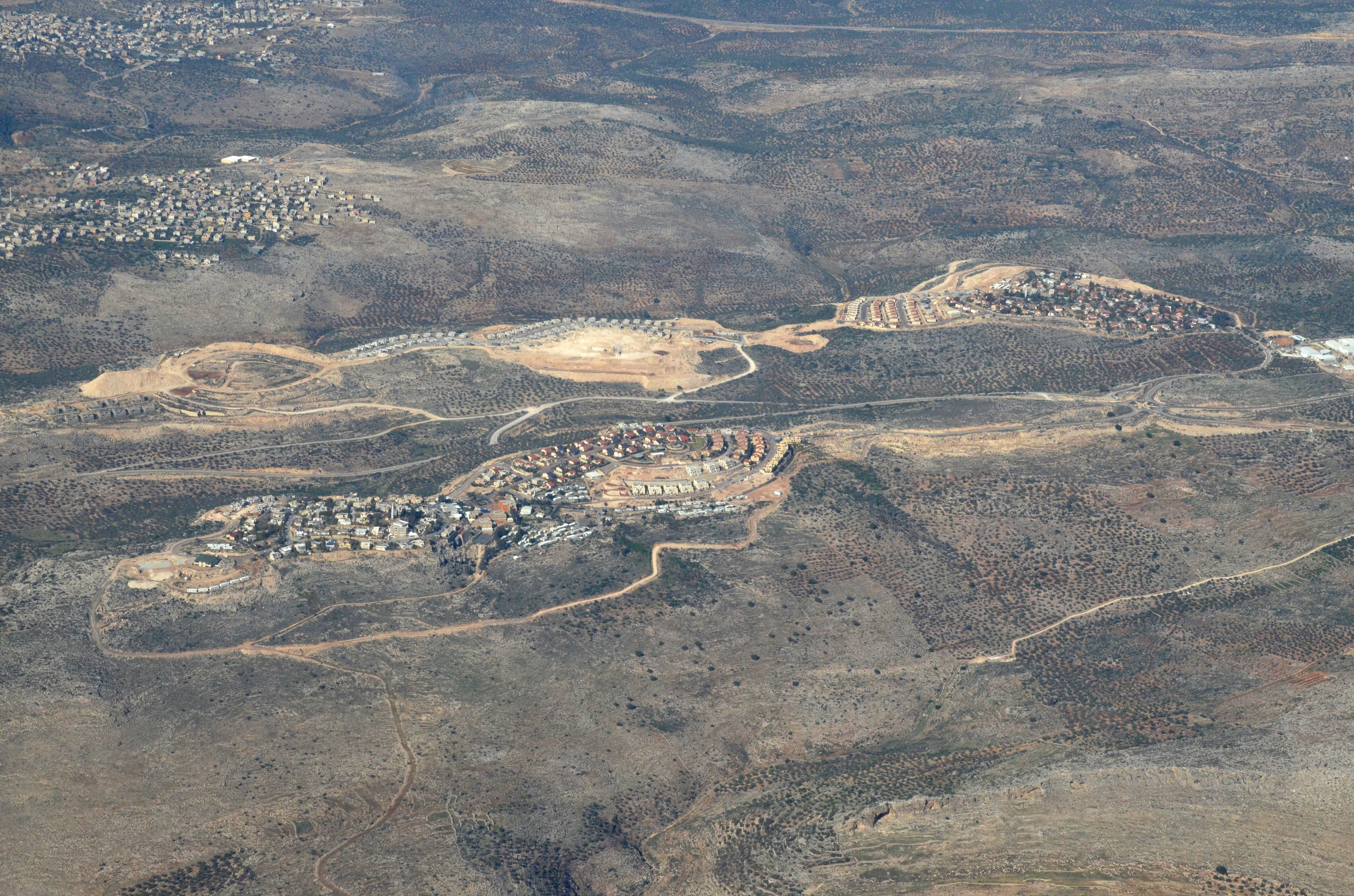 פדואל לשם ועלי זהב